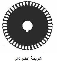 شريحة عضو دائر ملفوف